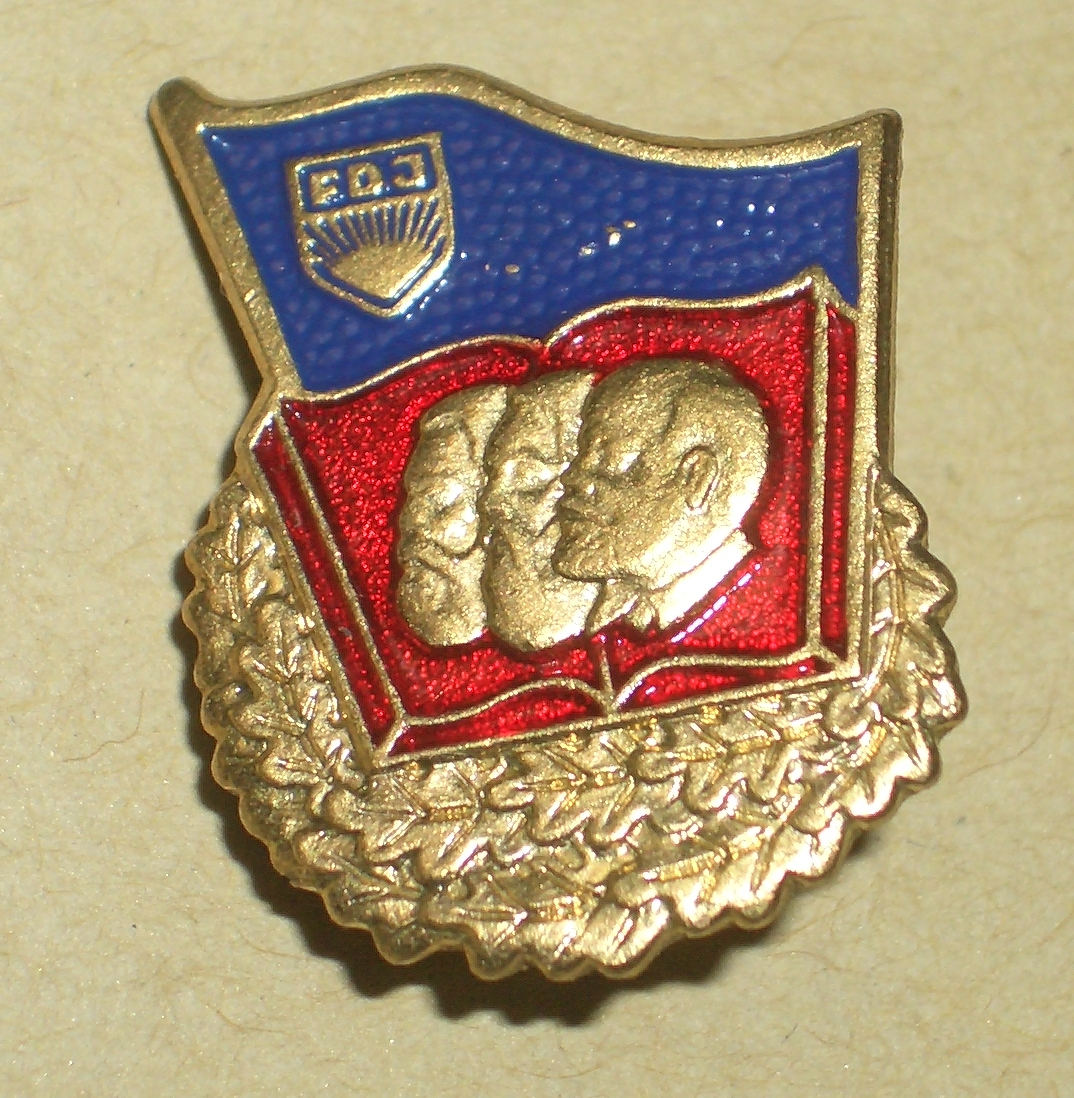 FDJ Abzeichen